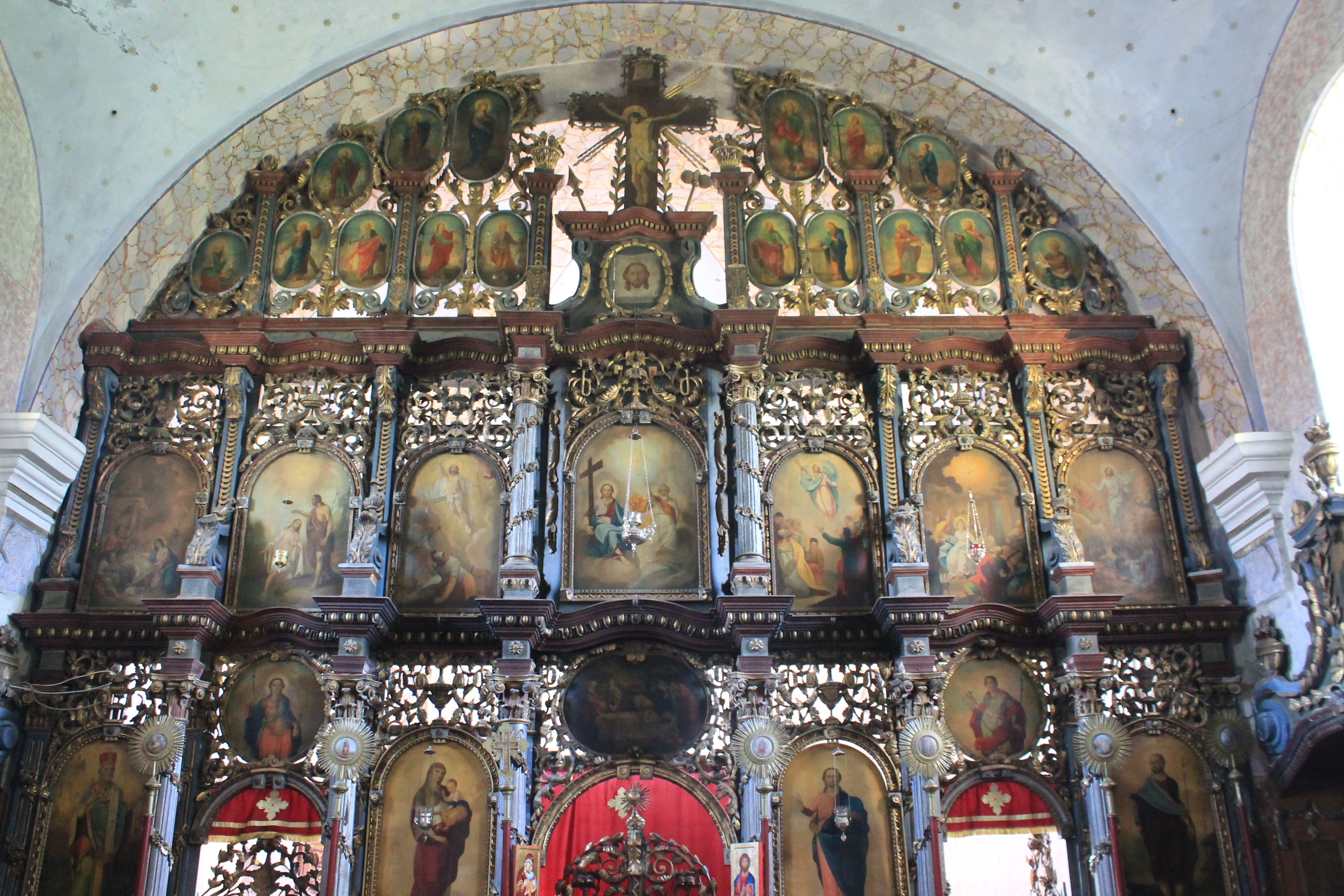 Crkva Sv. Nikole (Bačinci)